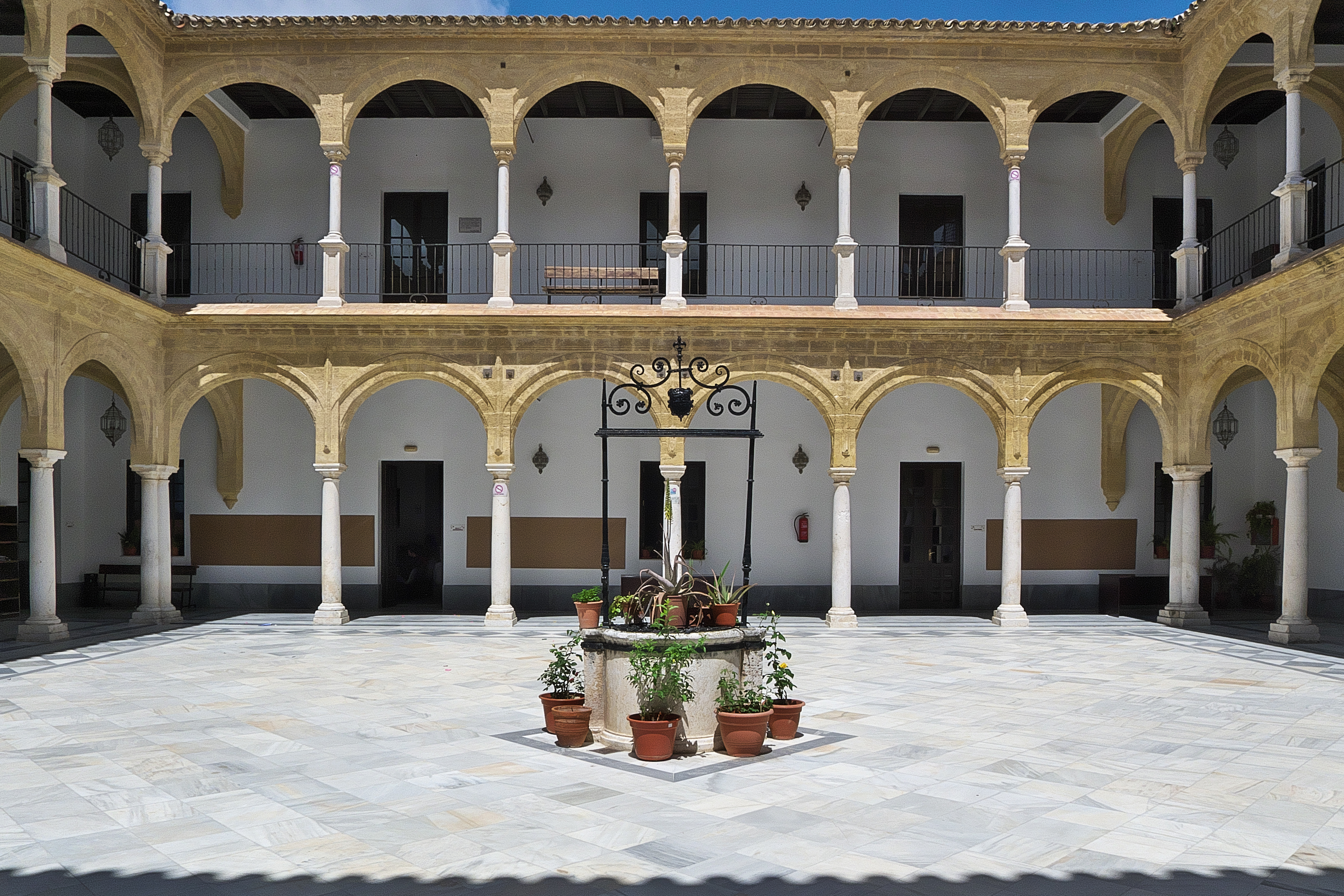 Juan Téllez-Girón funda la Universidad (1548) en Osuna, edificio que sigue los cánones renacentistas.